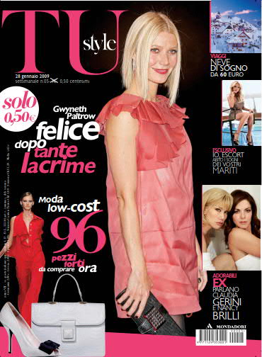 Copertina della rivista Tustyle, 28 gennaio 2009, Arnoldo Mondadori Editore.